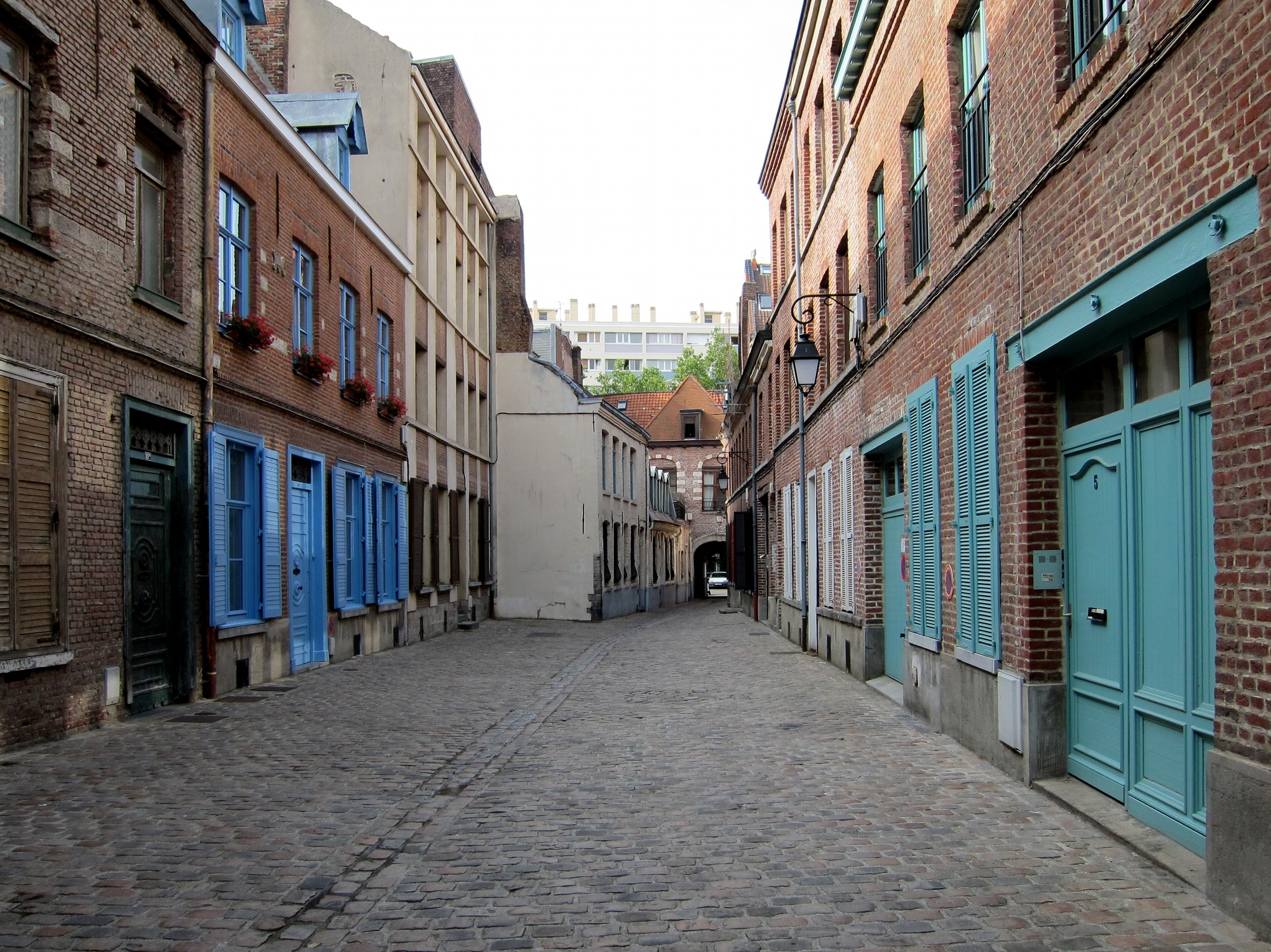 La rue des Brigittines à Lille (Nord).